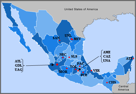 Mapa de ubicación de los equipos de la Primera División mexicana de la temporada 2007-08